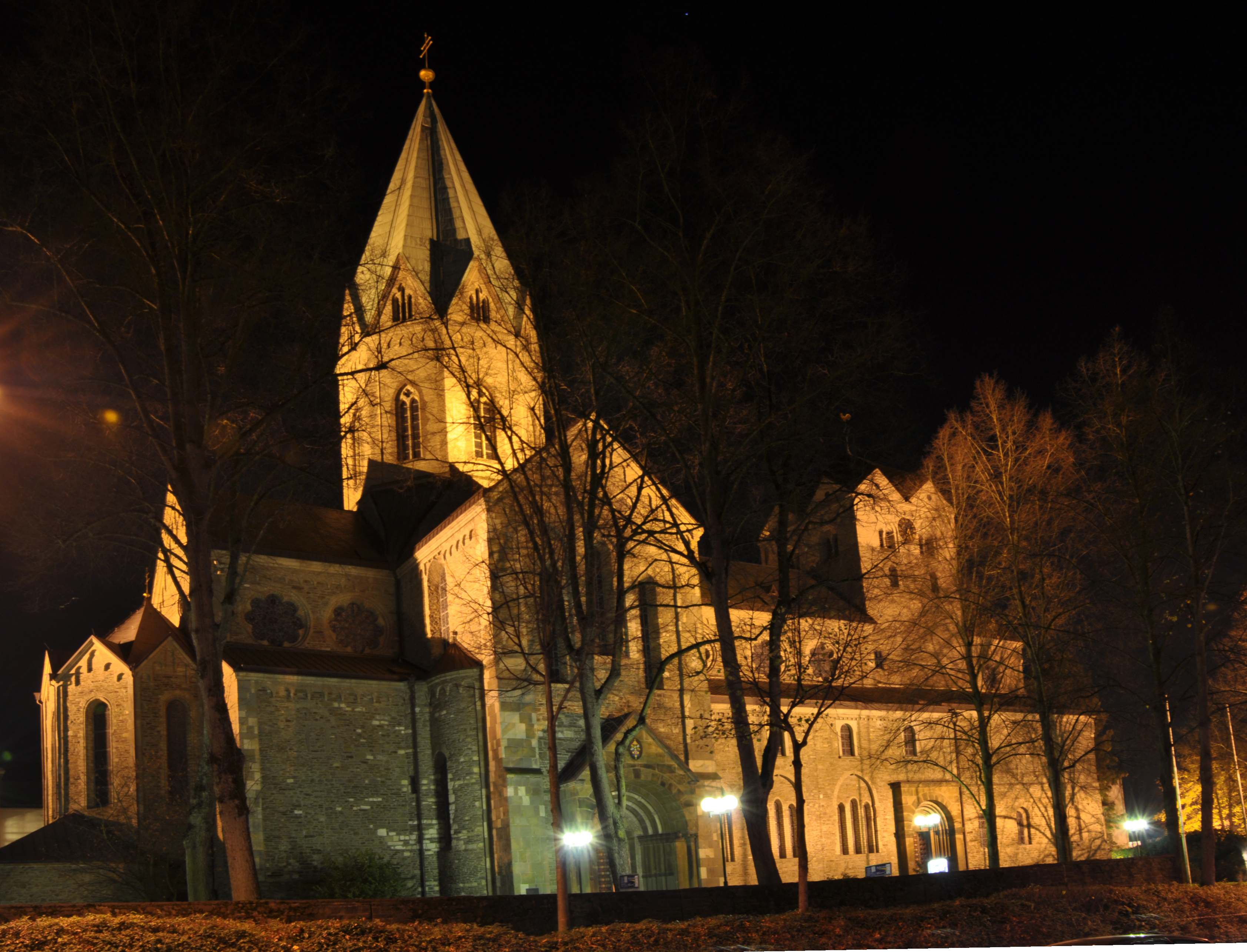 Exterior of St. Ludgerus (Werden) Abteikirche in Essen-Werden, Ludgerus-Kirche